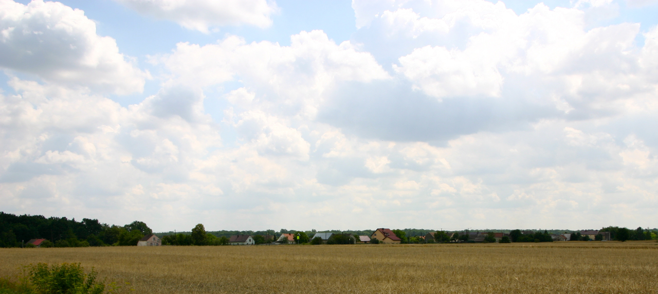 Dębina (dodatkowa nazwa w j. niem. Dambine) – wieś w Polsce położona w województwie opolskim, w powiecie prudnickim, w gminie Biała.